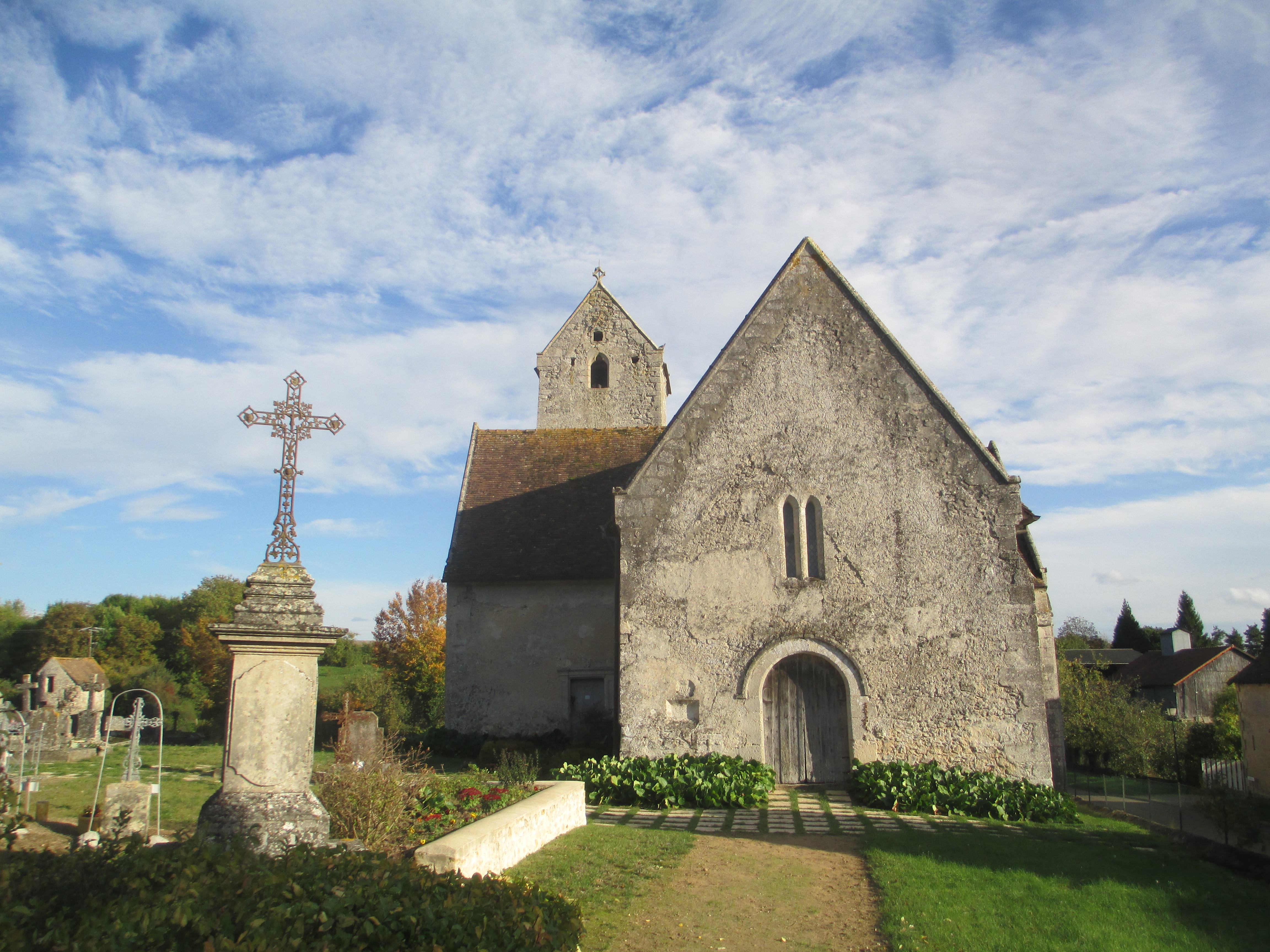 Église Saint-Jean-Baptiste de Vezot, dans la Sarthe. .